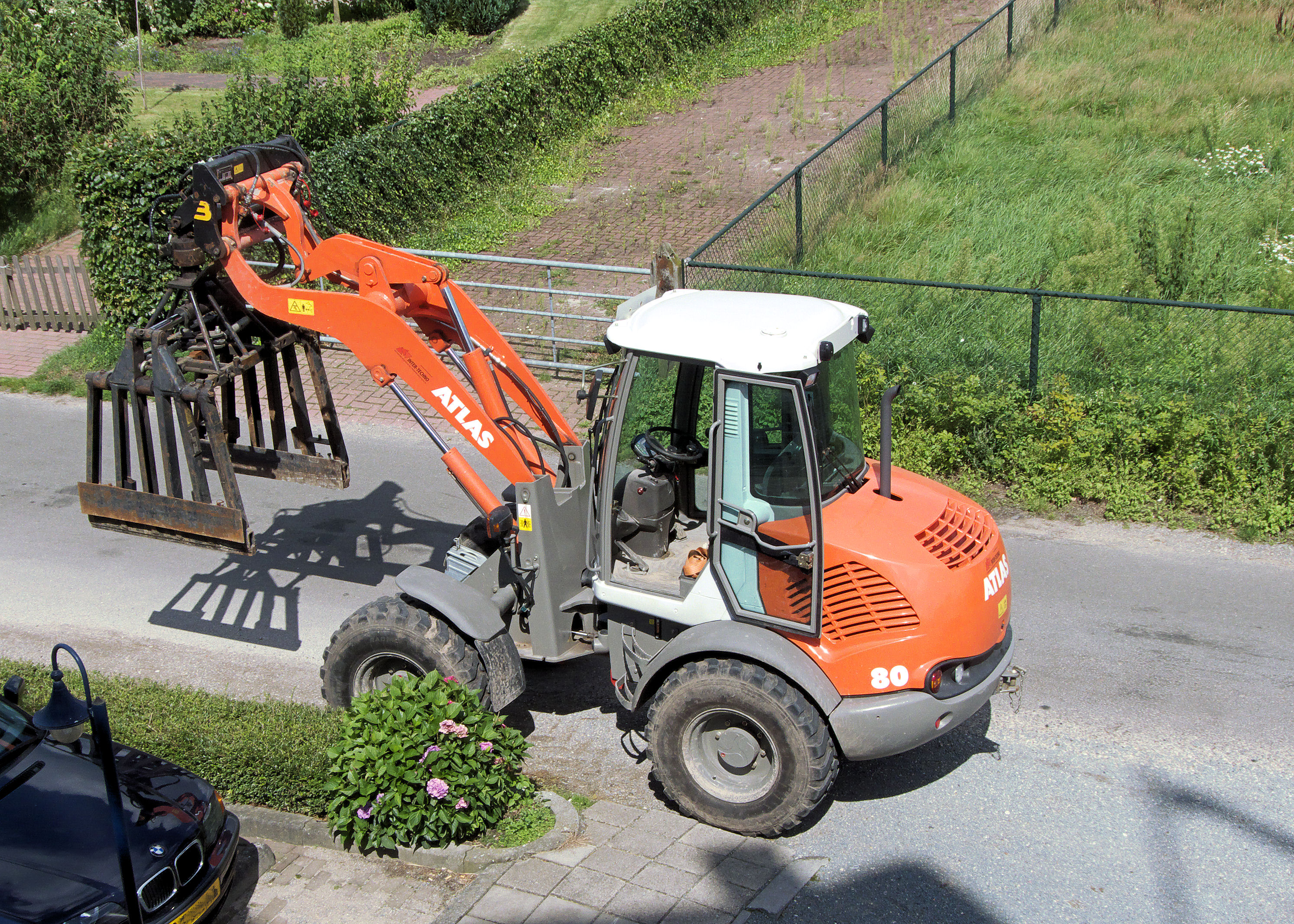 Atlas wiellader met stenenklem